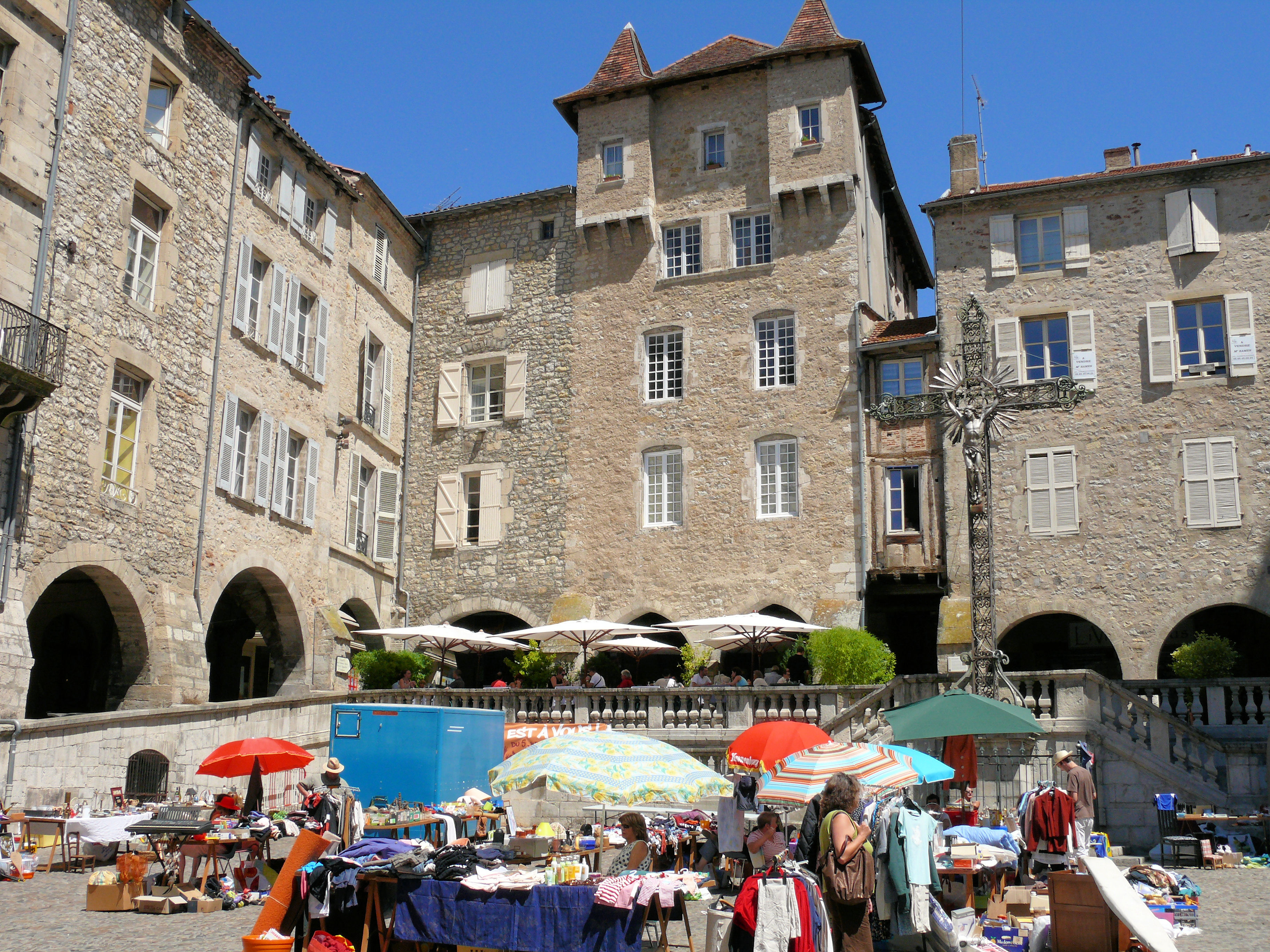 Villefranche-de-Rouergue - Place Notre-Dame